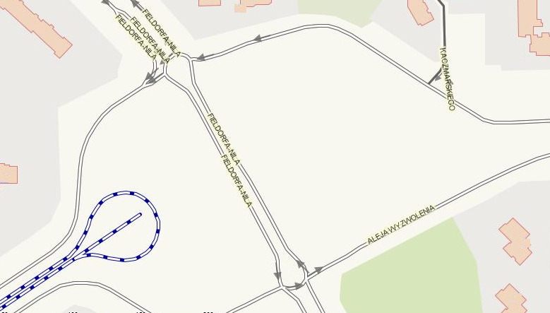 Raindrop Roundabout - Częstochowa, Poland